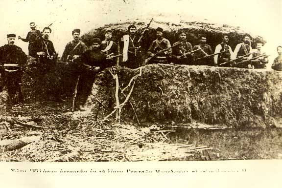 гръцките андартски капитани Калас, Никифорис и Аграс